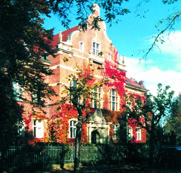 Potsdam-Mittelmark District building, Belzig; Landratsamt Potsdam-Mittelmark, Belzig